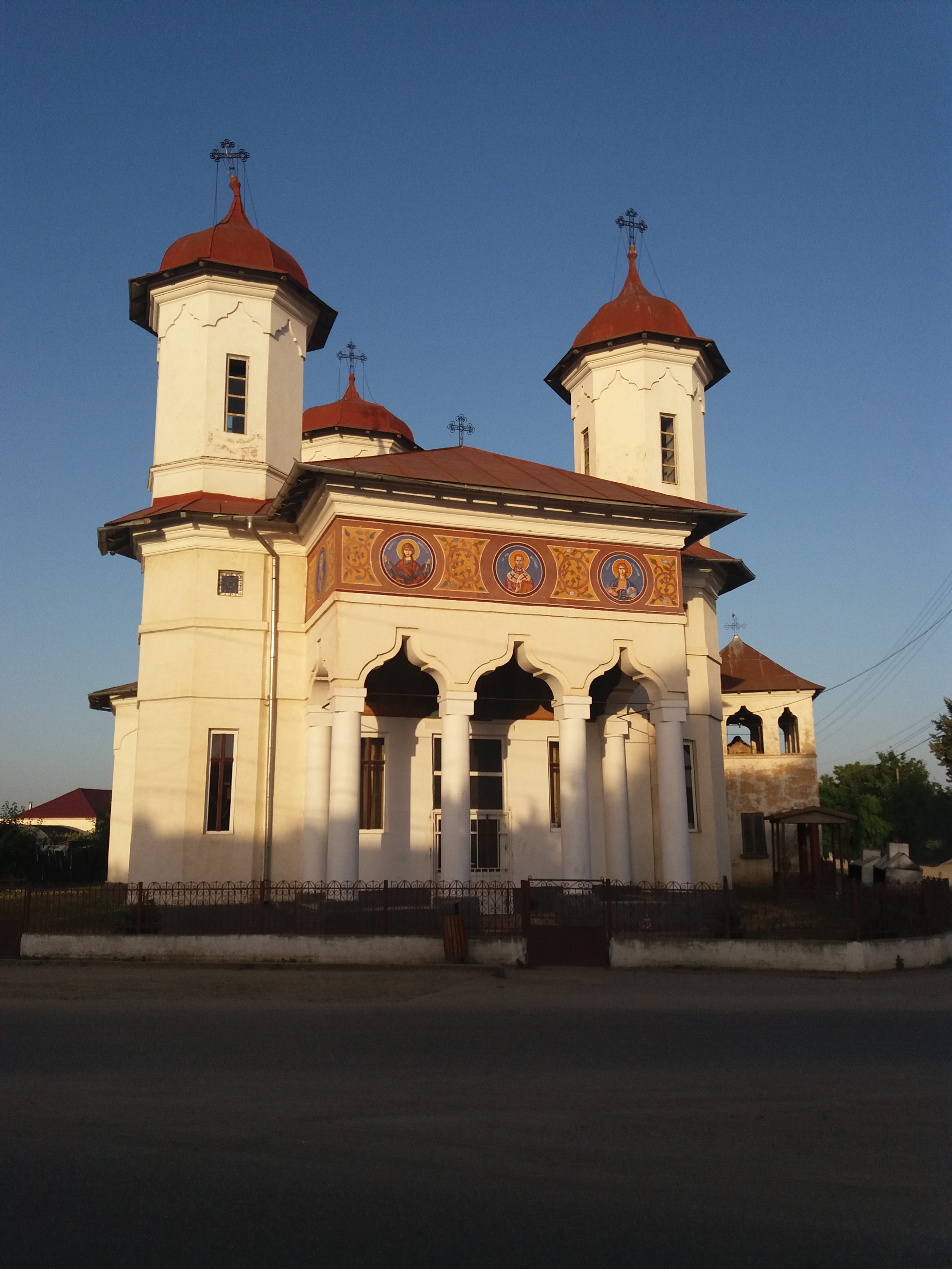 Biserica Sfântul Nicolae din Desa